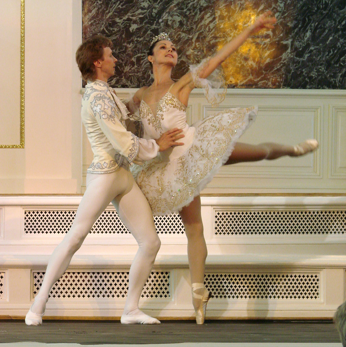 Ballet classique au théâtre de la Chapelle (Capella) à Saint-Pétersbourg (Russie). La Capella est la plus ancienne institution de musique professionnelle de la Russie. Créée en 1479 par le tsar Ivan III, elle fut amenée à Saint-Pétersbourg par Pierre le Grand.